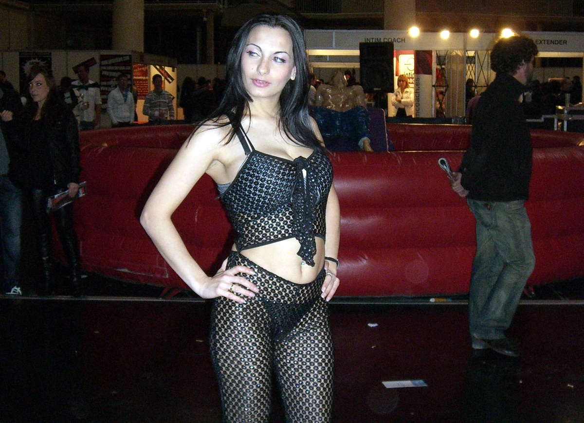 Veronica Simon - Celebrado en A Coruña, o 5, 6 e 7 de marzo